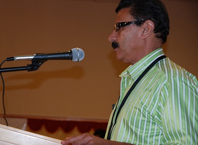 ഹമീദ് ചേന്നമംഗലൂർ മസ്കറ്റില്‍ നടന്ന ഒരു മാധ്യമ സെമിനാറിൽ